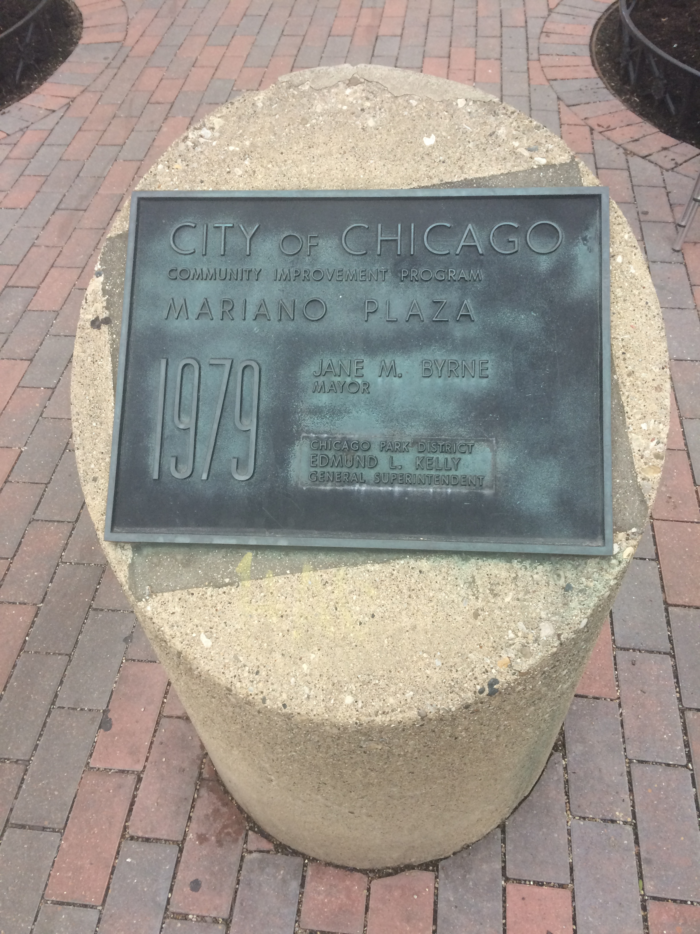 name plaque at Mariano Plaza in Chicago